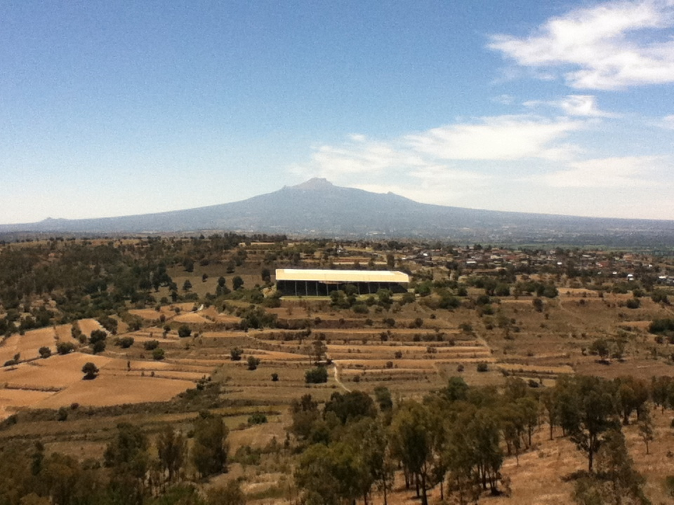 Vista de Cacaxtla